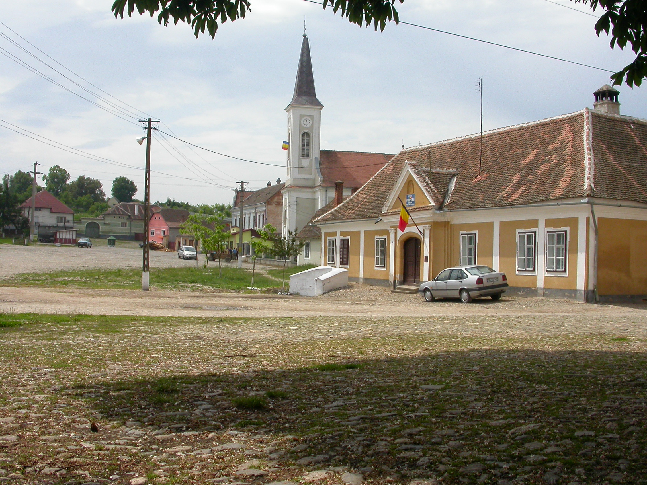 Ansamblul rural "Centrul istoric"